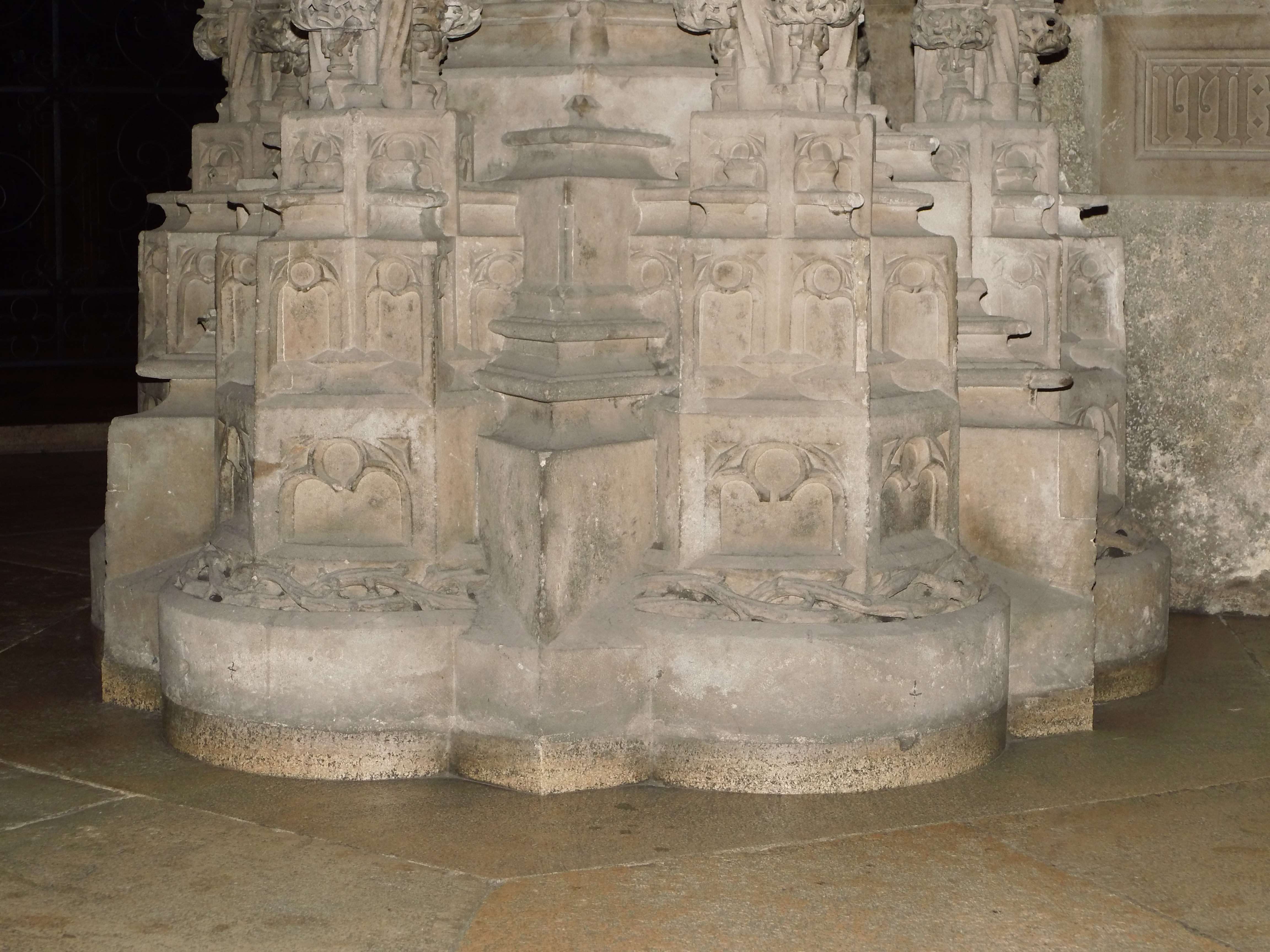 Sockel der Kanzel des Stephansdoms (Wien)